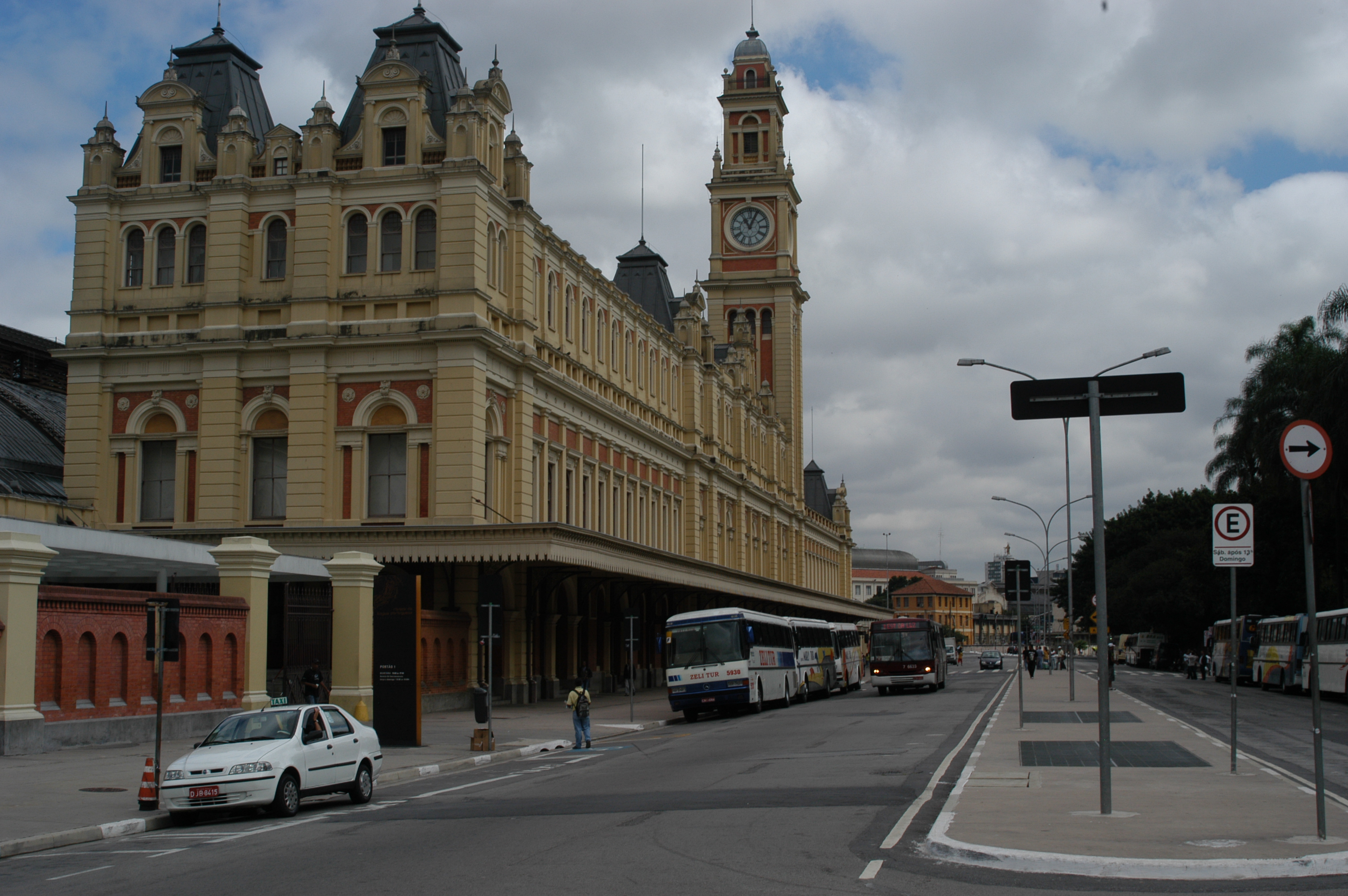 Visão da famosa Estação da Luz, em São Paulo, Brasil